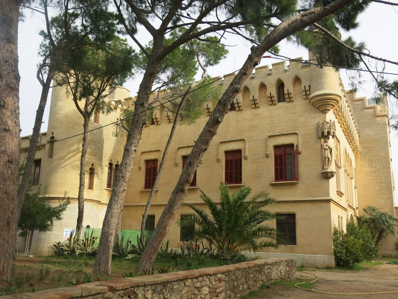 castell de Vila-Seca